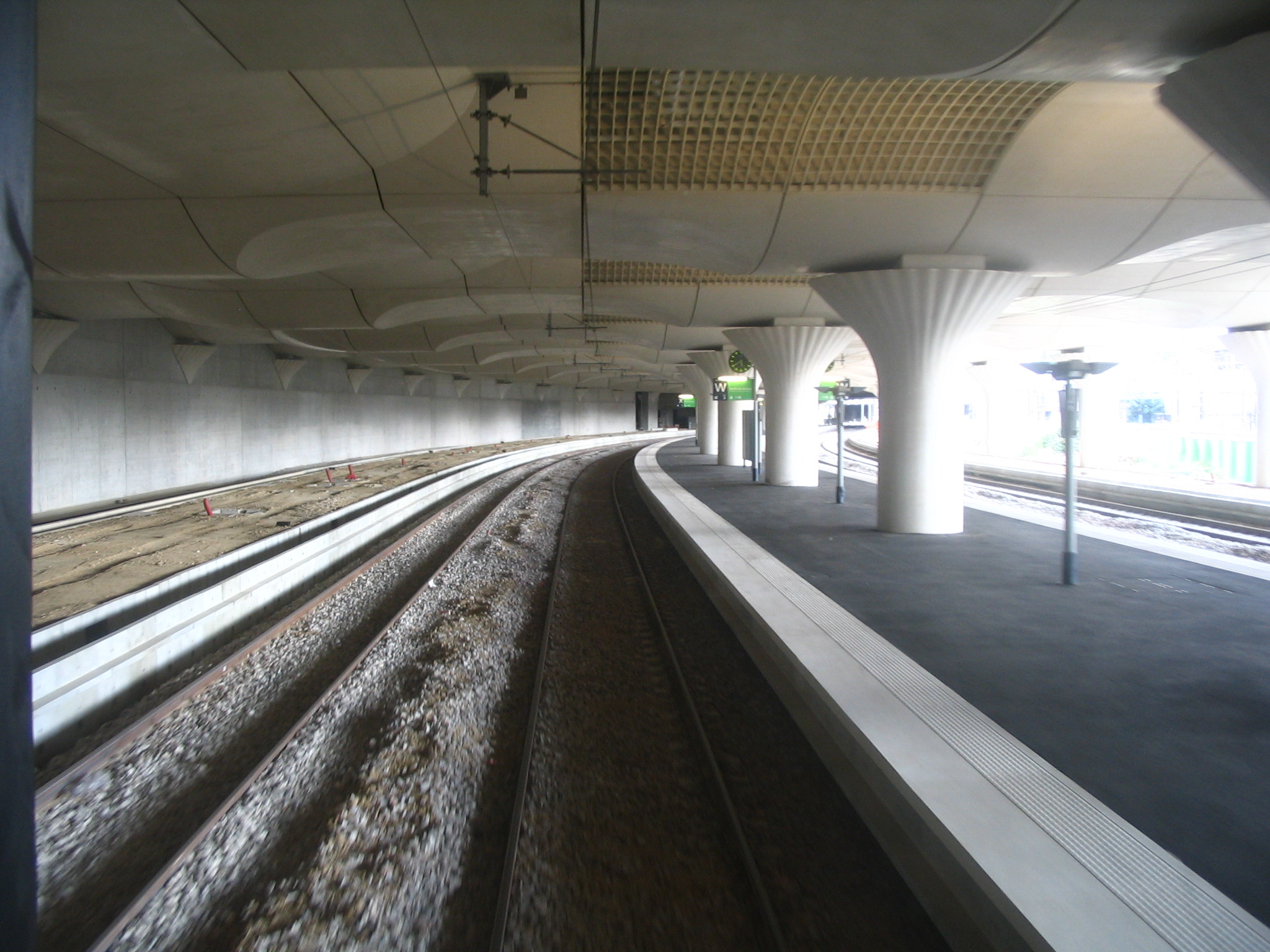 Voie 3 de la gare de Paris Austerlitz, dans la nouvelle partie de la gare construite sous l'Avenue de France